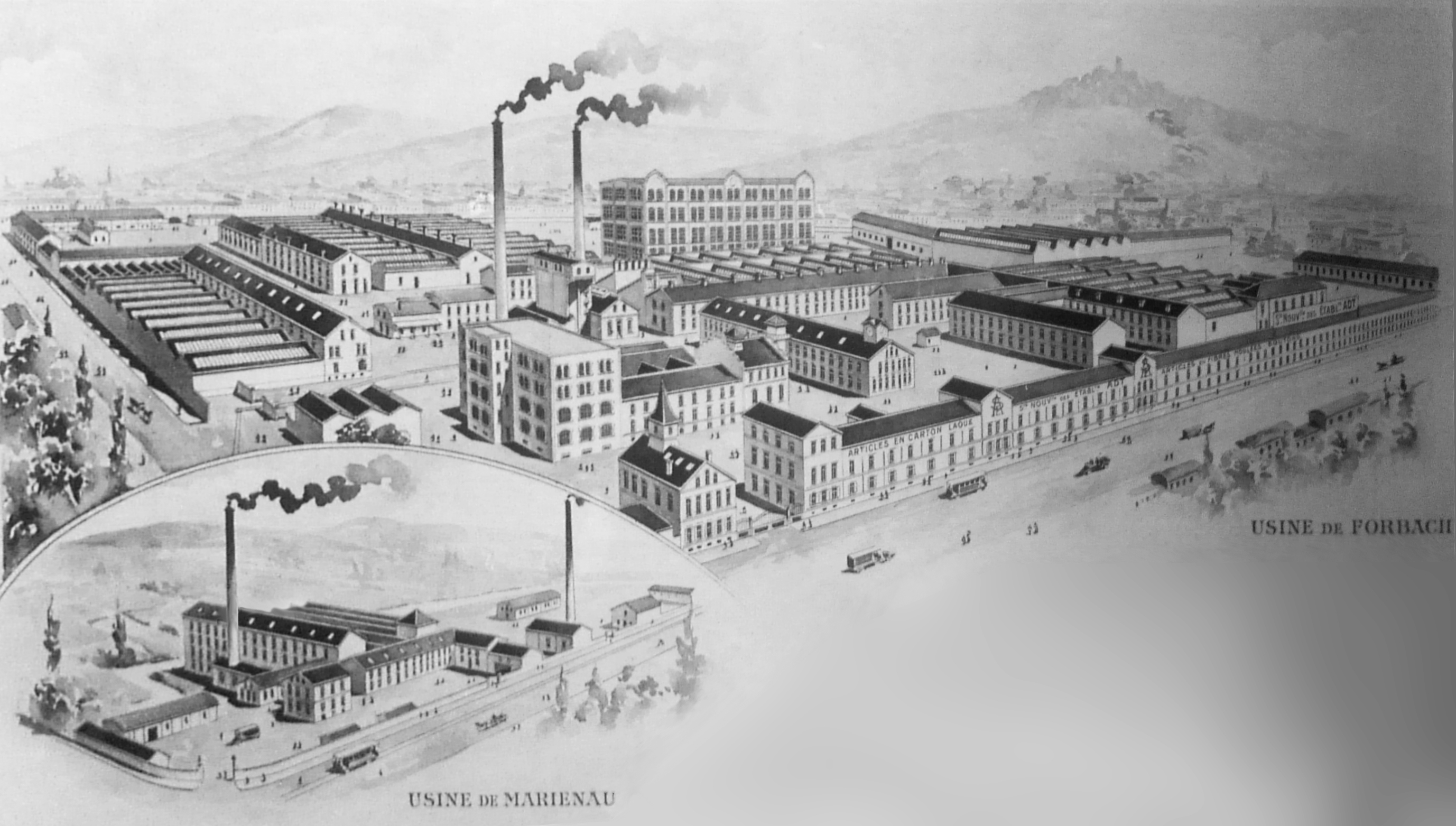 Pappmachéfabrik Forbach. Historische Darstellung um 1900